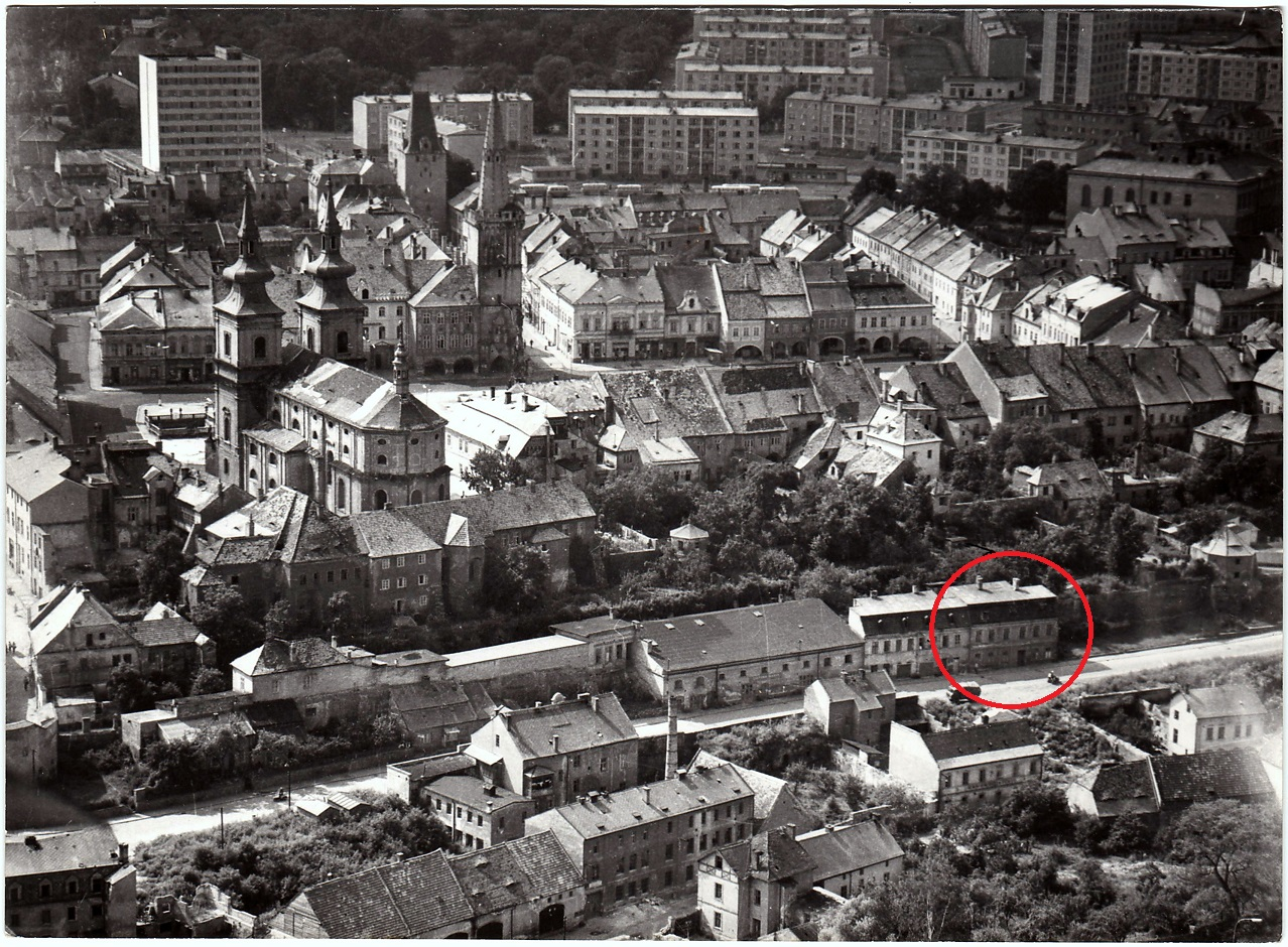 pohled na město Kadaň, zvýrazněn dům U Velryby (čp. 489)